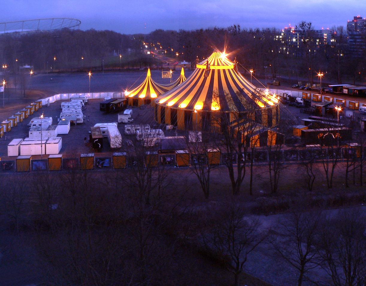 Flic Flac Cicus Zelt in Hannover auf dem Schützenplatz.